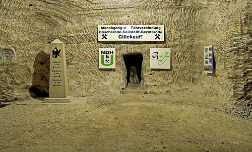 Mönchgang, Kaliwerk Sollstedt